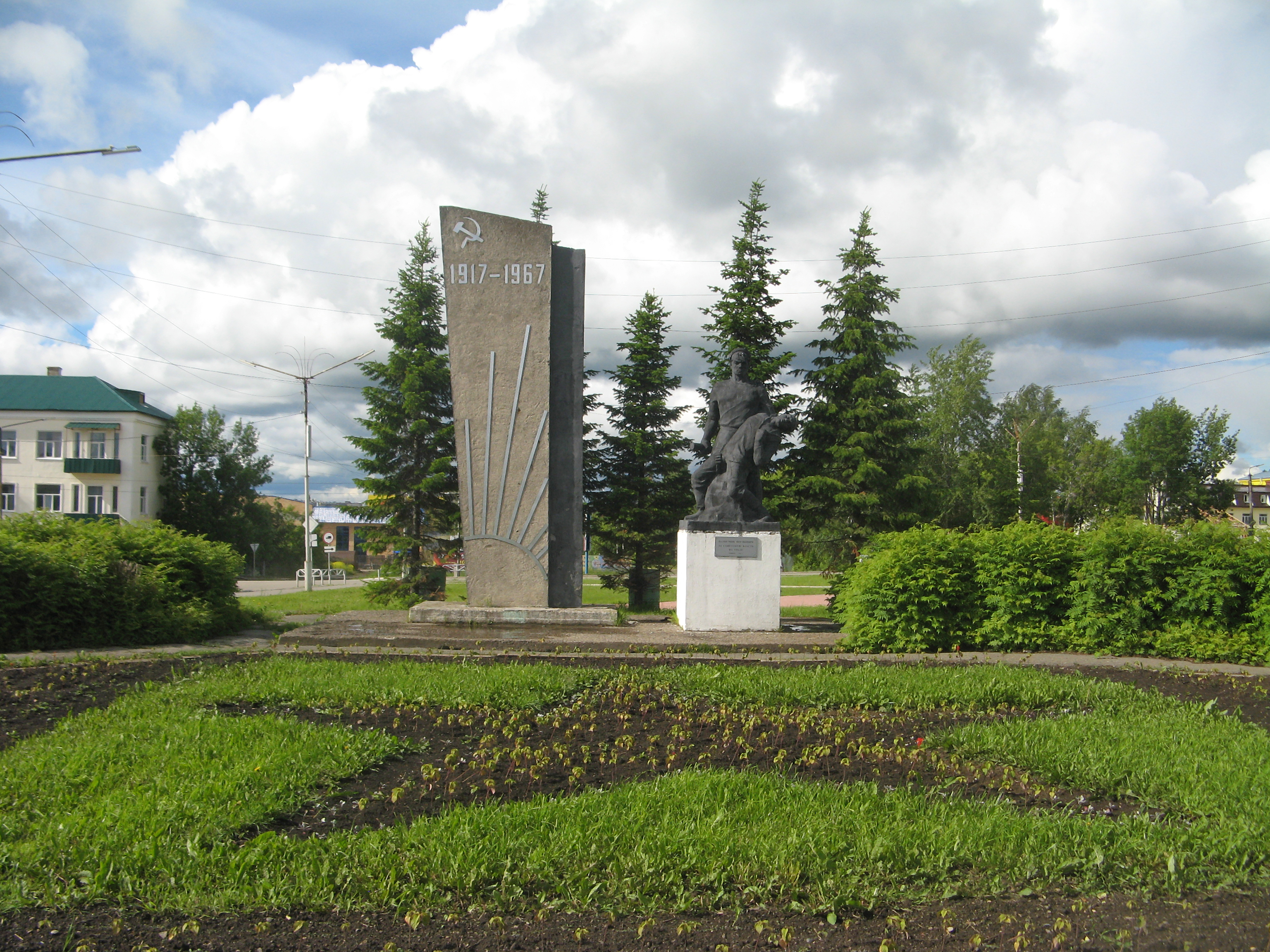 Памятник погибшим за Советскую власть на Урале: улица Мира, 29 (Театральный сквер), Лысьва, Пермский край